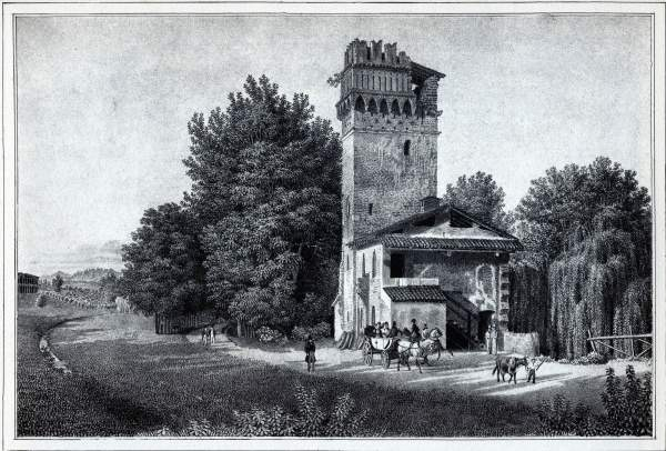 Veduta del Mulino del Cantone, prima degli interventi del Tazzini, in una stampa del Sanquirico.